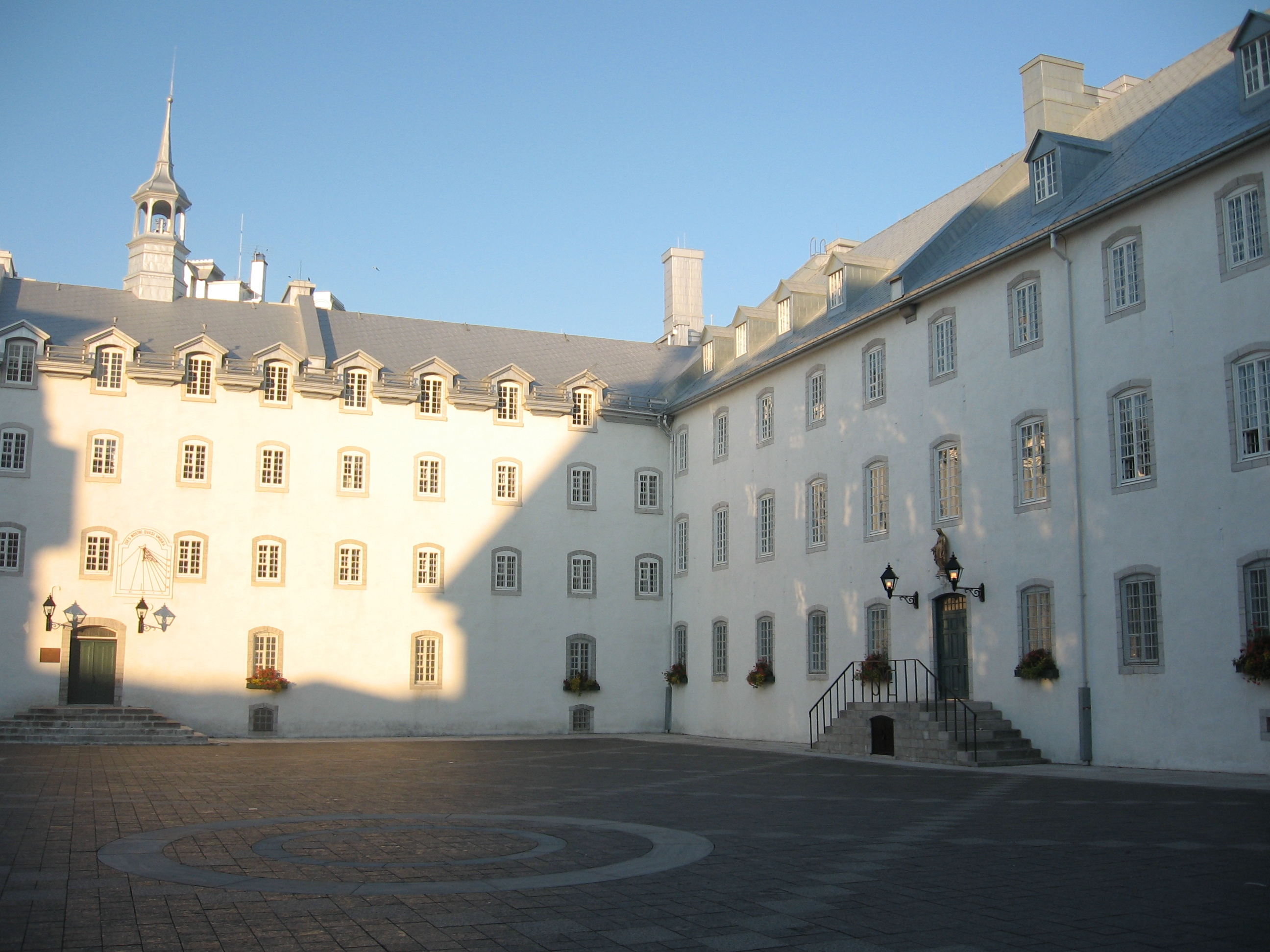 Cour du Vieux Séminaire de Québec (Aile de la procure et aile des parloirs)